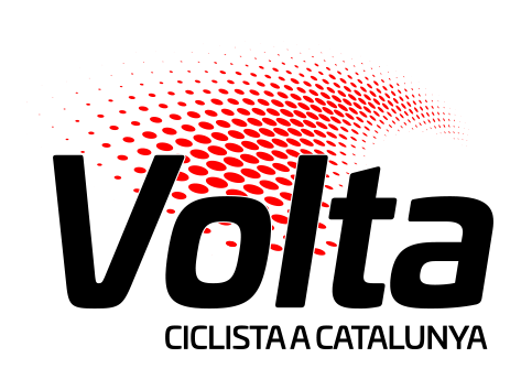 Logotip de la Volta Ciclista a Catalunya, actualitzat el 2020